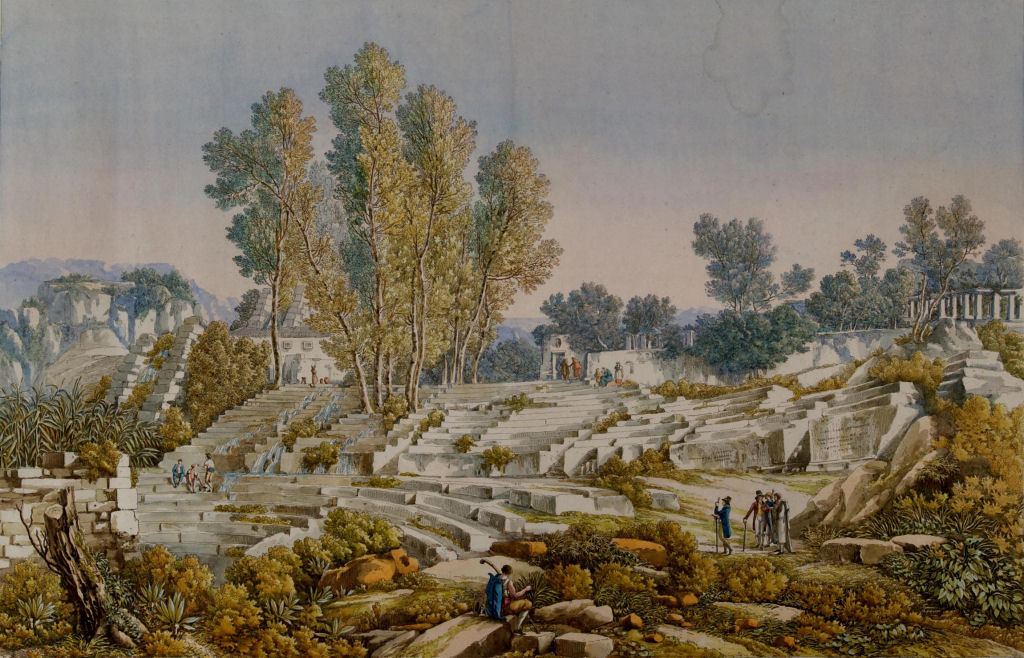 Louis-François Cassas (attrib.) (1756 - 1827): Théatre de Syracuse. Collection Privèe.